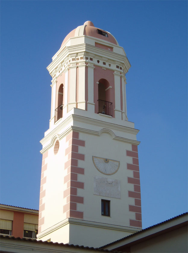 Torre del Reloj de Estepona, España. Antiguo minarete de mezquita nazarí, se convirtió en campanario de iglesia cristiana en tiempos de los Reyes Católicos. En el s. XVIII se le añaden los elementos neoclásicos que presenta en la actualidad.